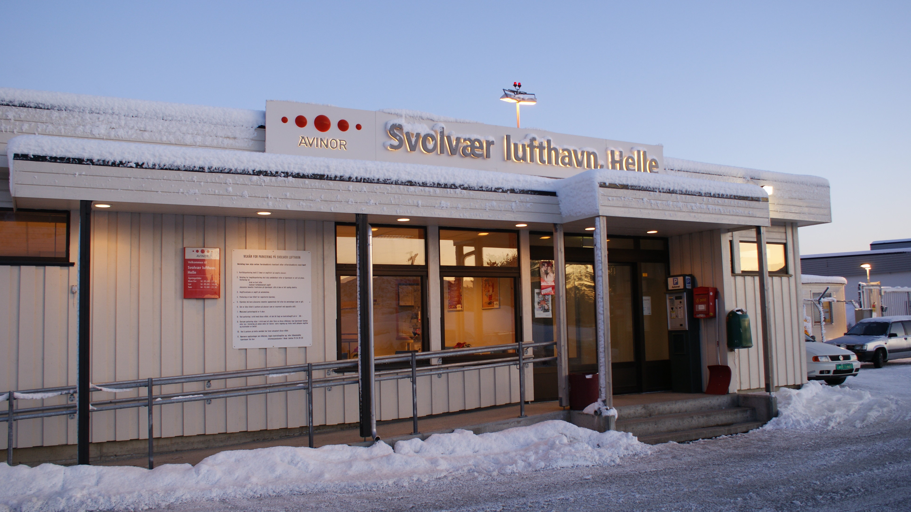 Svolvær Airport, Lofoten, Nordland, Norway. Winter evening.